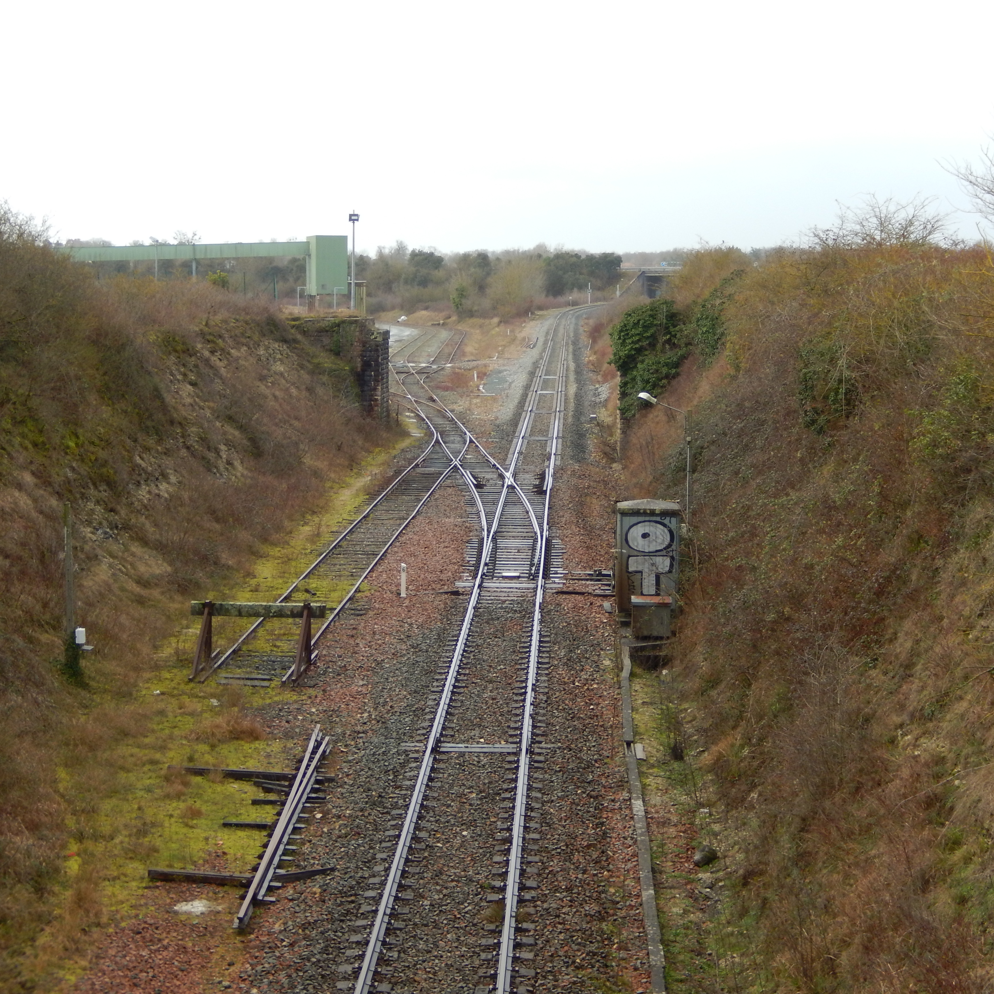 La voie ferrée SNCF reliant Saintes à Royan, photographiée au sud-ouest de Saintes à hauteur de la zone d'activités de Saint-Vivien.